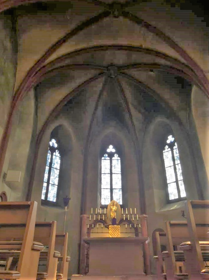 Wallfahrtskirche Maria vom rauhen Wind in Kälberau